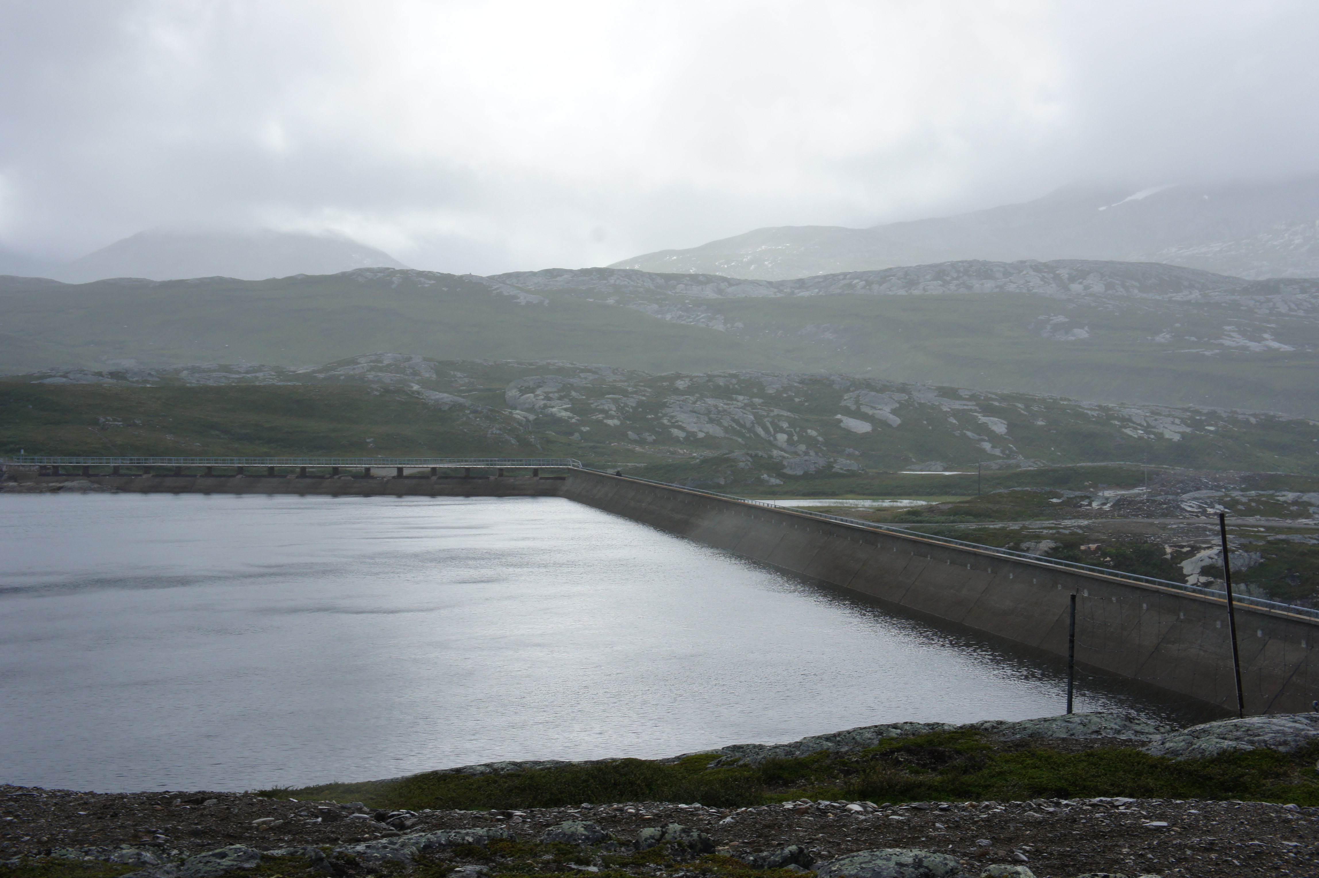 Sylsjödammen